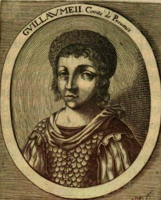 William II of Provence